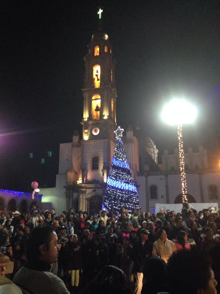 Fiesta del Paseo de carros 25 de Diciembre en Uriangato, Gto.